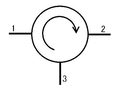 3 port circulator schematic